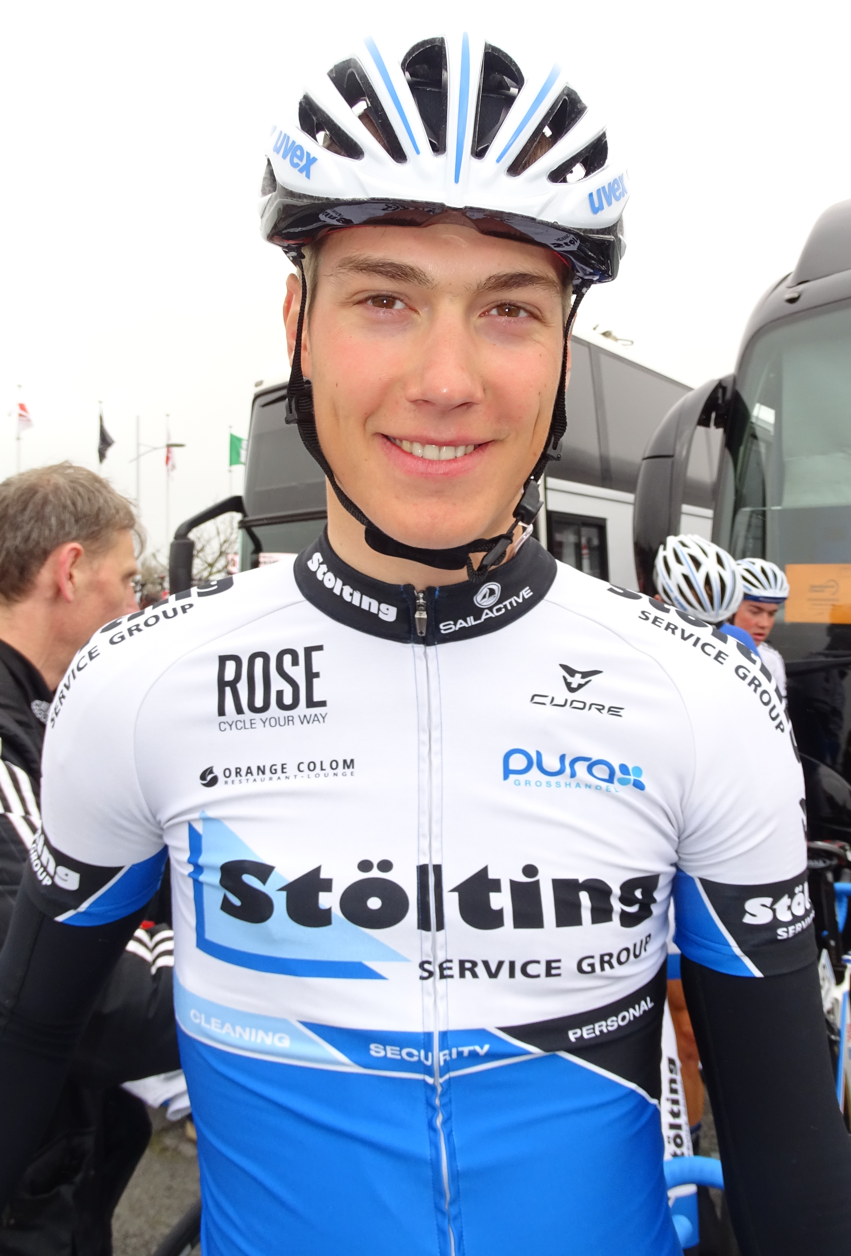 Reportage réalisé le vendredi 18 mars à l'occasion du départ de la Handzame Classic 2016 à Bredene, Belgique.